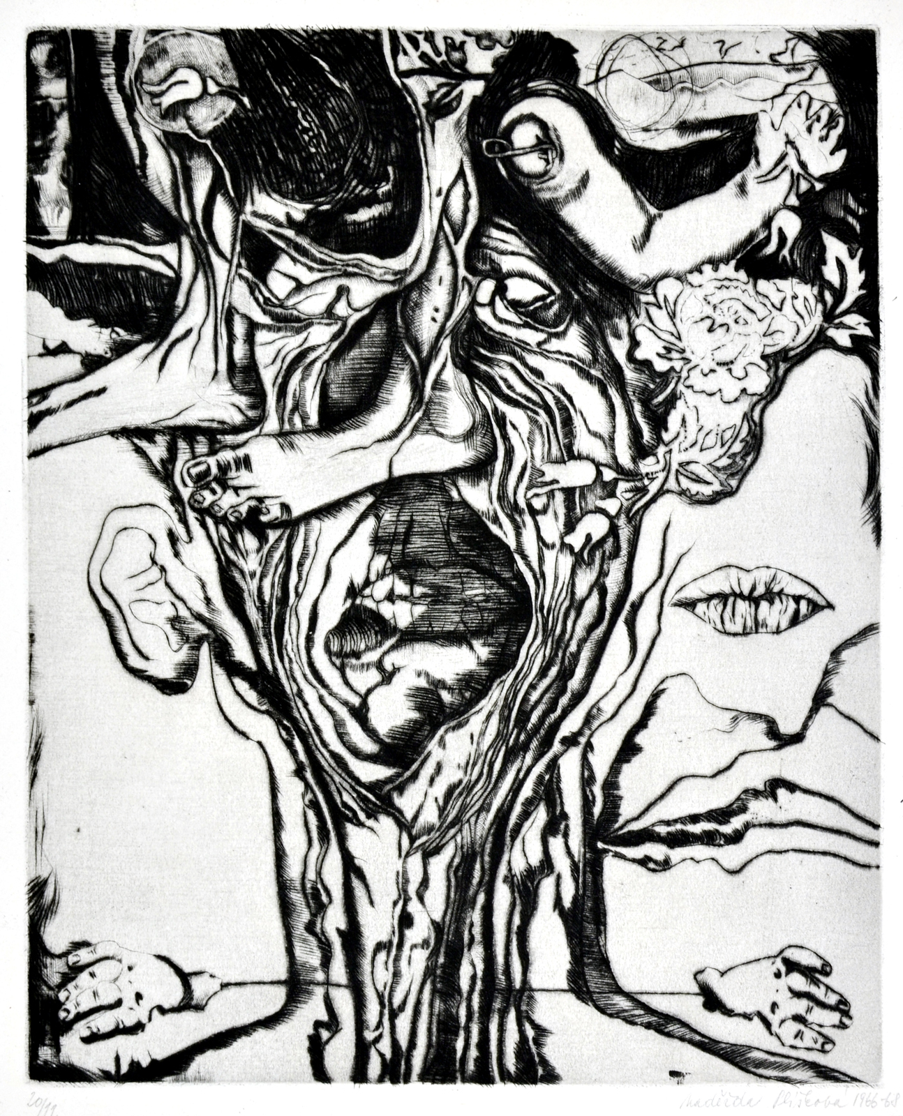 Naděžda Plíšková, Bez názvu, suchá jehla, 33x27 cm, 1966-68